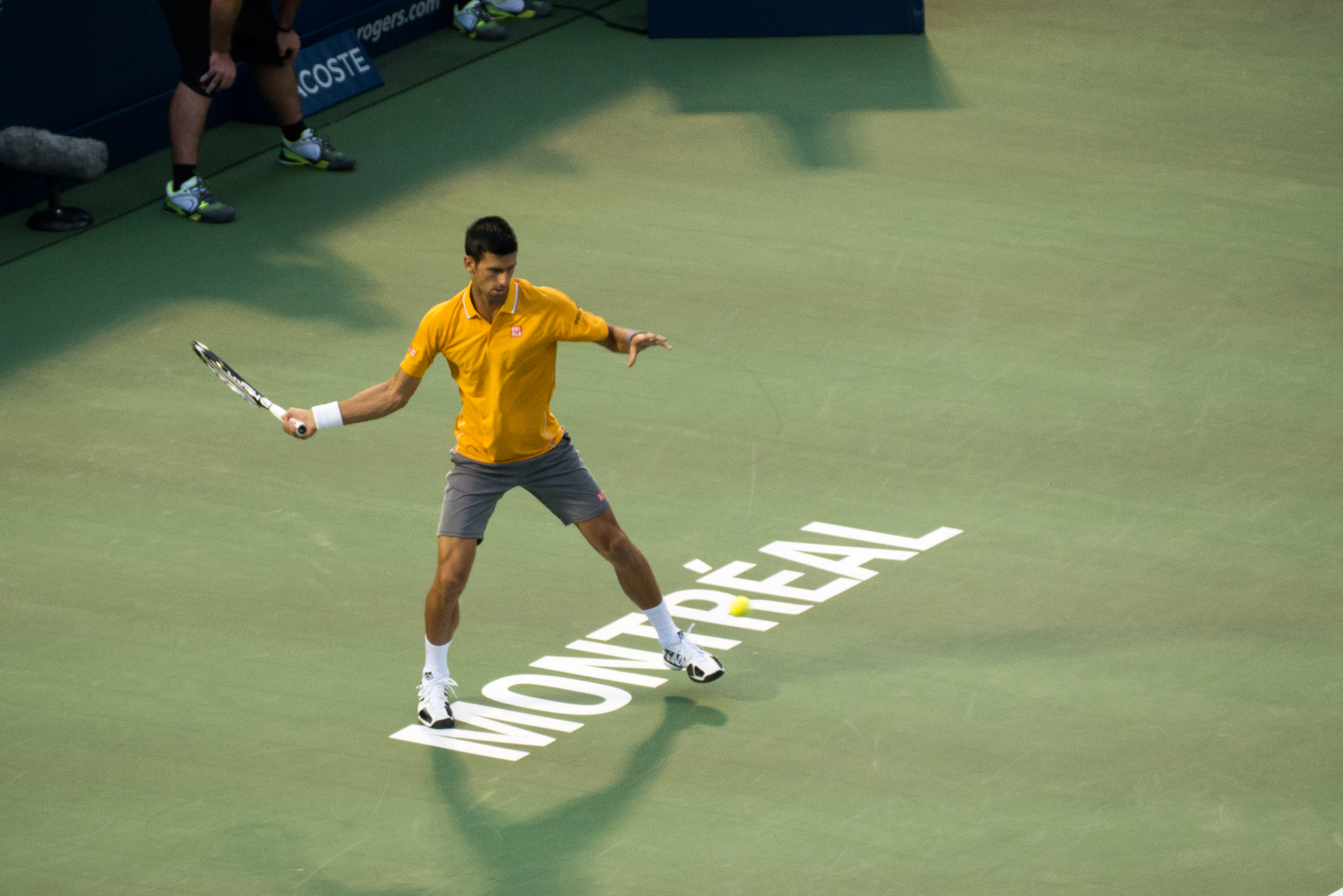 Surprenant la petit 40-150 d'Olympus !